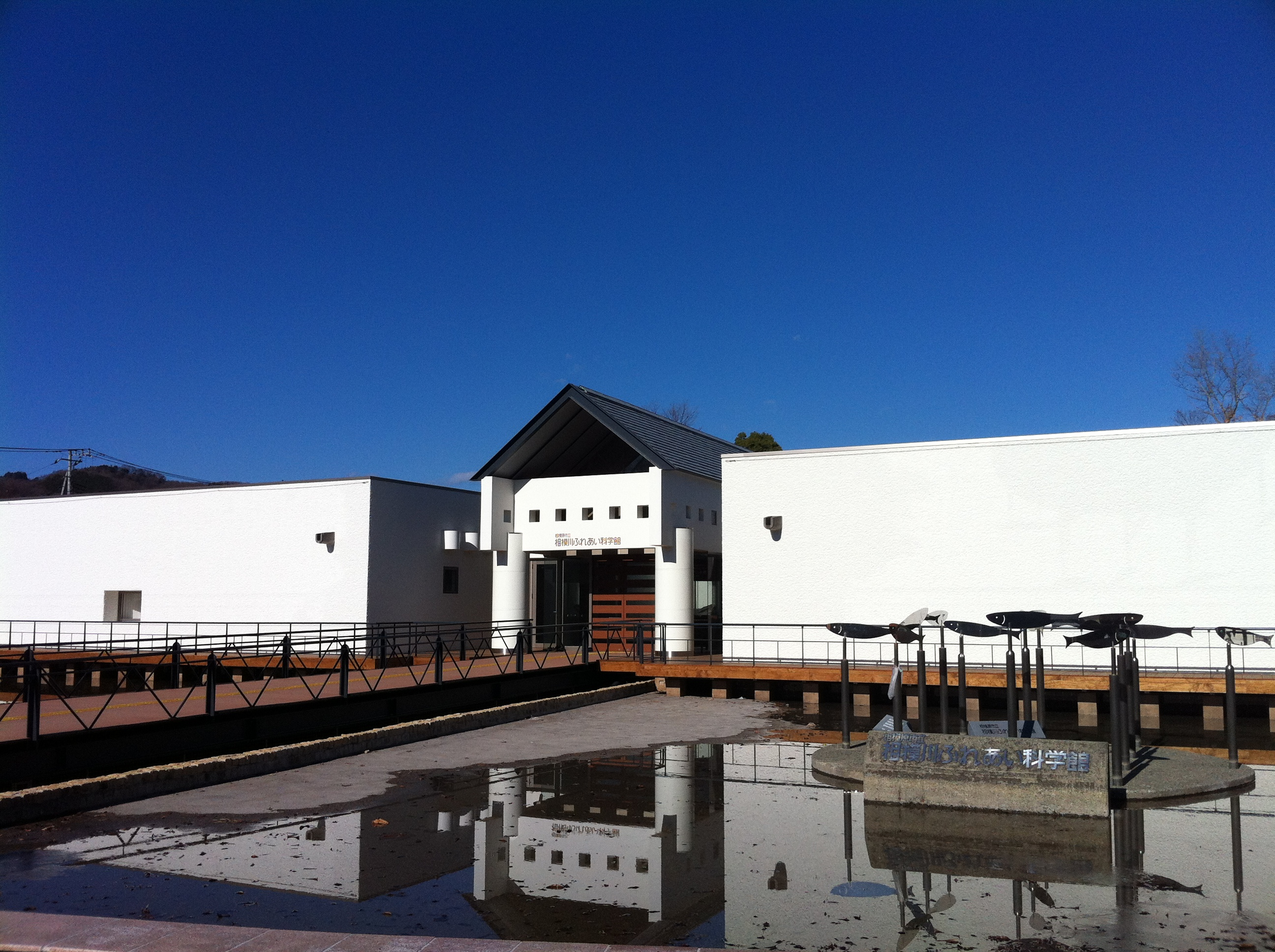 相模川ふれあい科学館 アクアリウムさがみはら 外観